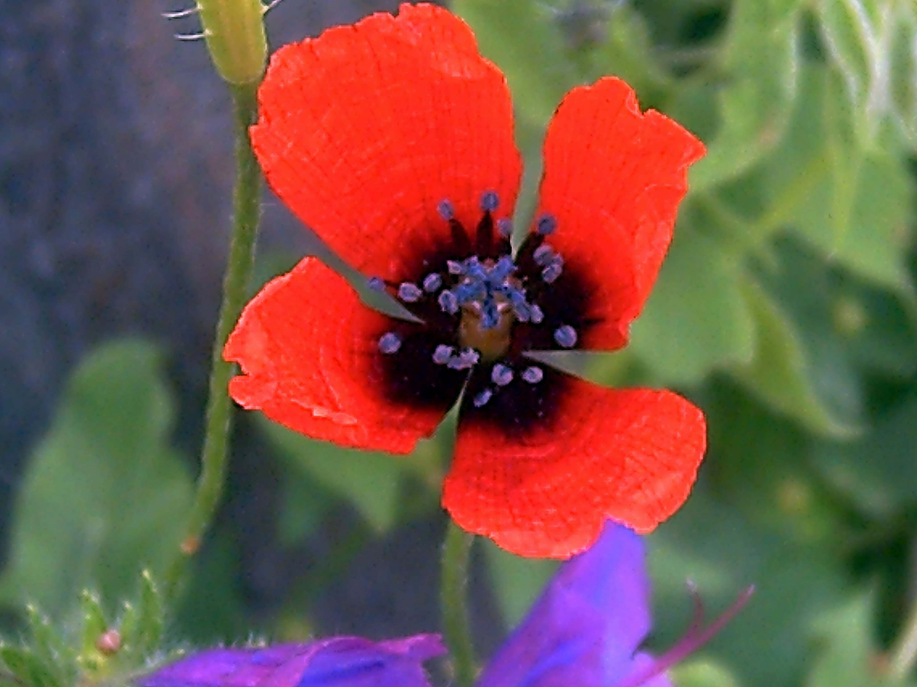 Papaver argemone Closeup Dehesa Boyal de Puertollano